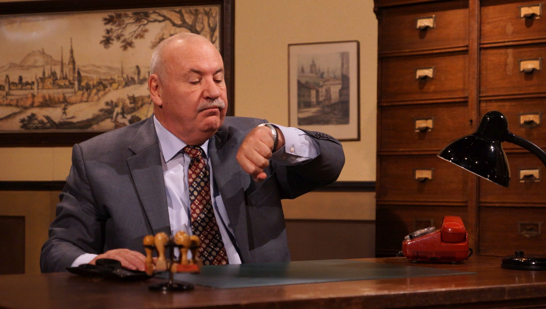 Der Bürgermeister gespielt von Karlheinz Hartmann